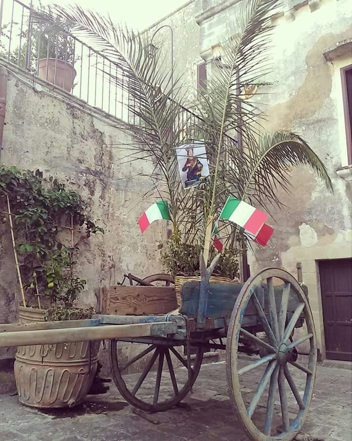 La Panara Antica, allestita dall'omonima associazione.